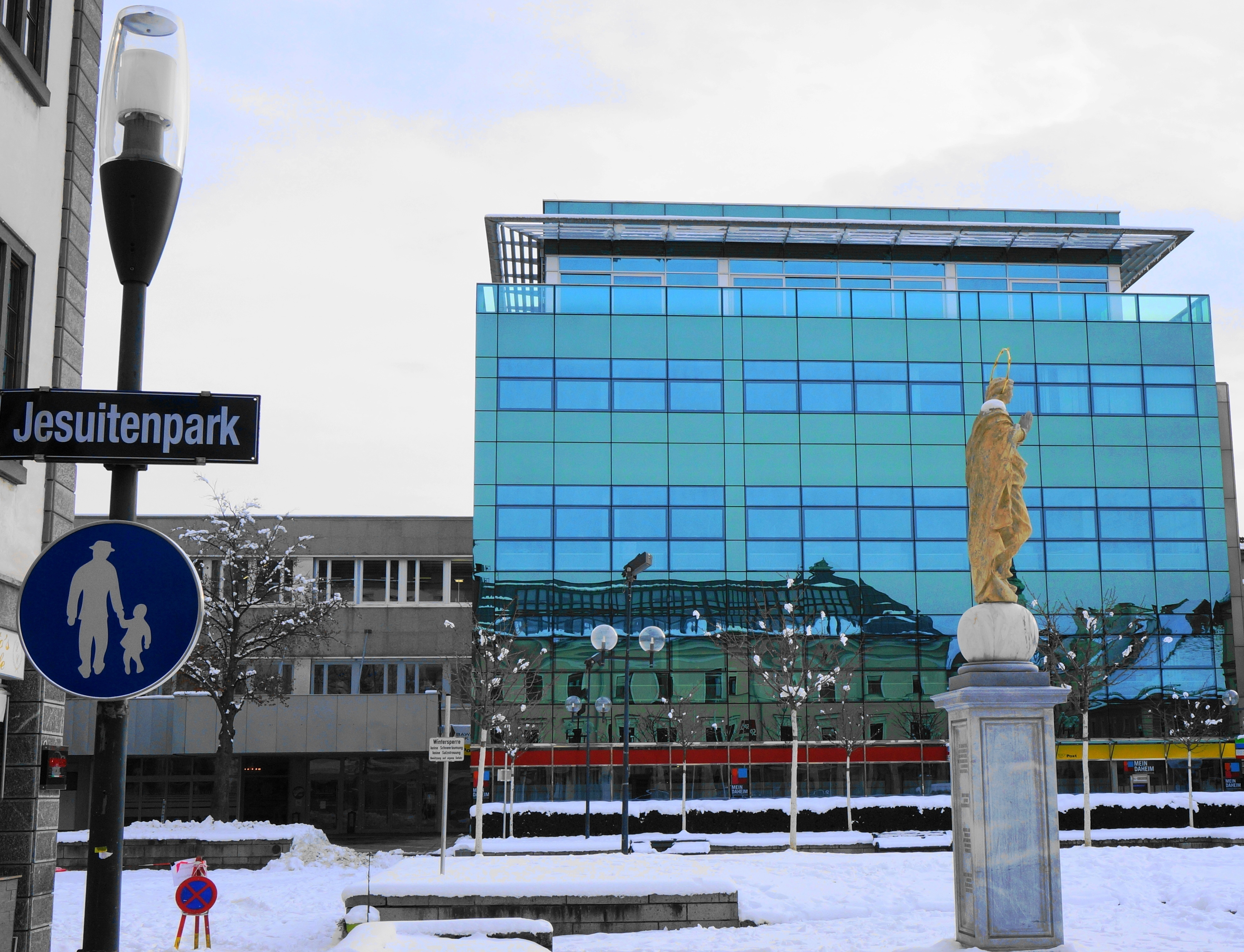 Im 16. Jahrhundert hatten sich beinahe alle Kärntner Landstände der lutherischen Gegenreformation angeschlossen. In Klagenfurt kann bereits ab den 1570er Jahren von einer durchgehend protestantischen Bevölkerung gesprochen werden. Die Bürger wurden vor die Wahl gestellt, zum Katholizismus zurückzukehren oder das Land zu verlassen, Bücher wurden verbrannt und die evangelischen Kirchen vorübergehend geschlossen. Vor allem die Jesuiten, aber auch andere im Zug der Gegenreformation angesiedelte Orden prägten nun sowohl die geistige und kulturelle Weiterentwicklung als auch mit zahlreichen neuen Kirchen- und Klosterbauten (Marienkirche mit Franziskanerkloster 1617, Kapuzinerkirche und -kloster 1646, Neugestaltung von St. Egid und St. Peter und Paul) das Gesicht der Stadt Klagenfurt in Kärnten, Österreich, EU. Nach der Aufhebung des Jesuitenordens 1773 ist die Stadt Klagenfurt seit 1787/93 Sitz des Gurker Domkapitels.